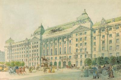 K.u.K. Reichskriegs-Ministerium. Aquarell